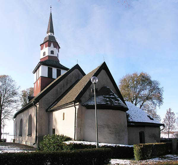 Björkeberg kyrka, Diocese of Linköping, Sweden.